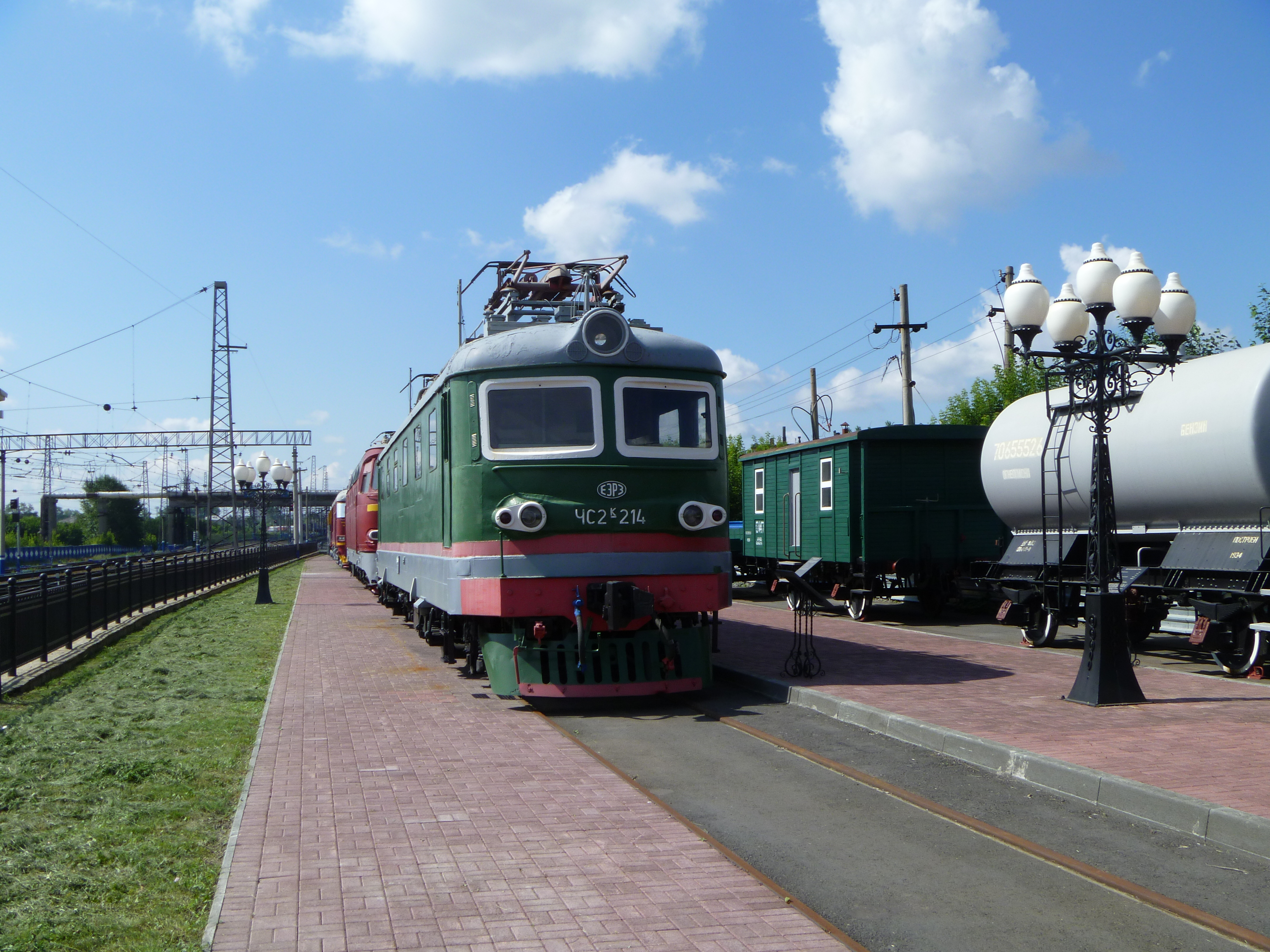 Электровоз ЧС2к-214 в Челябинском музее железнодорожной техники